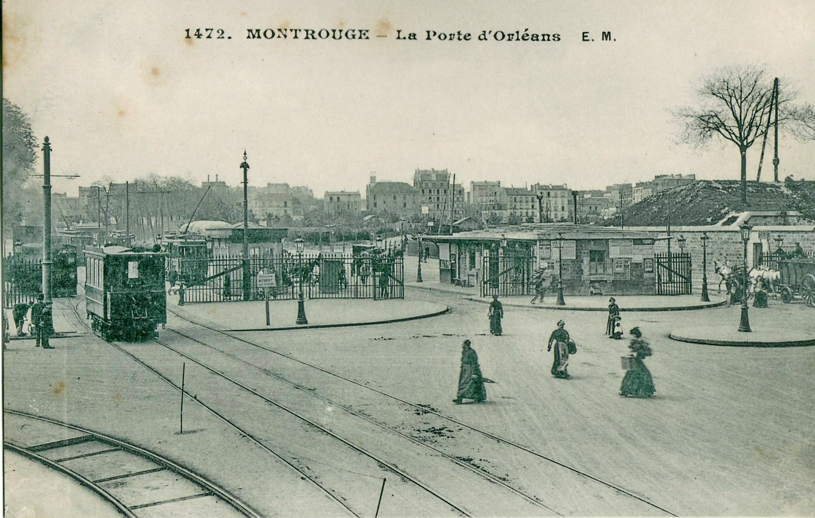 Carte postale ancienne éditée par EM, n°1472MONTROUGE - La Porte d'Orléans.Vue au premier plan des voies de l'Arpajonnais